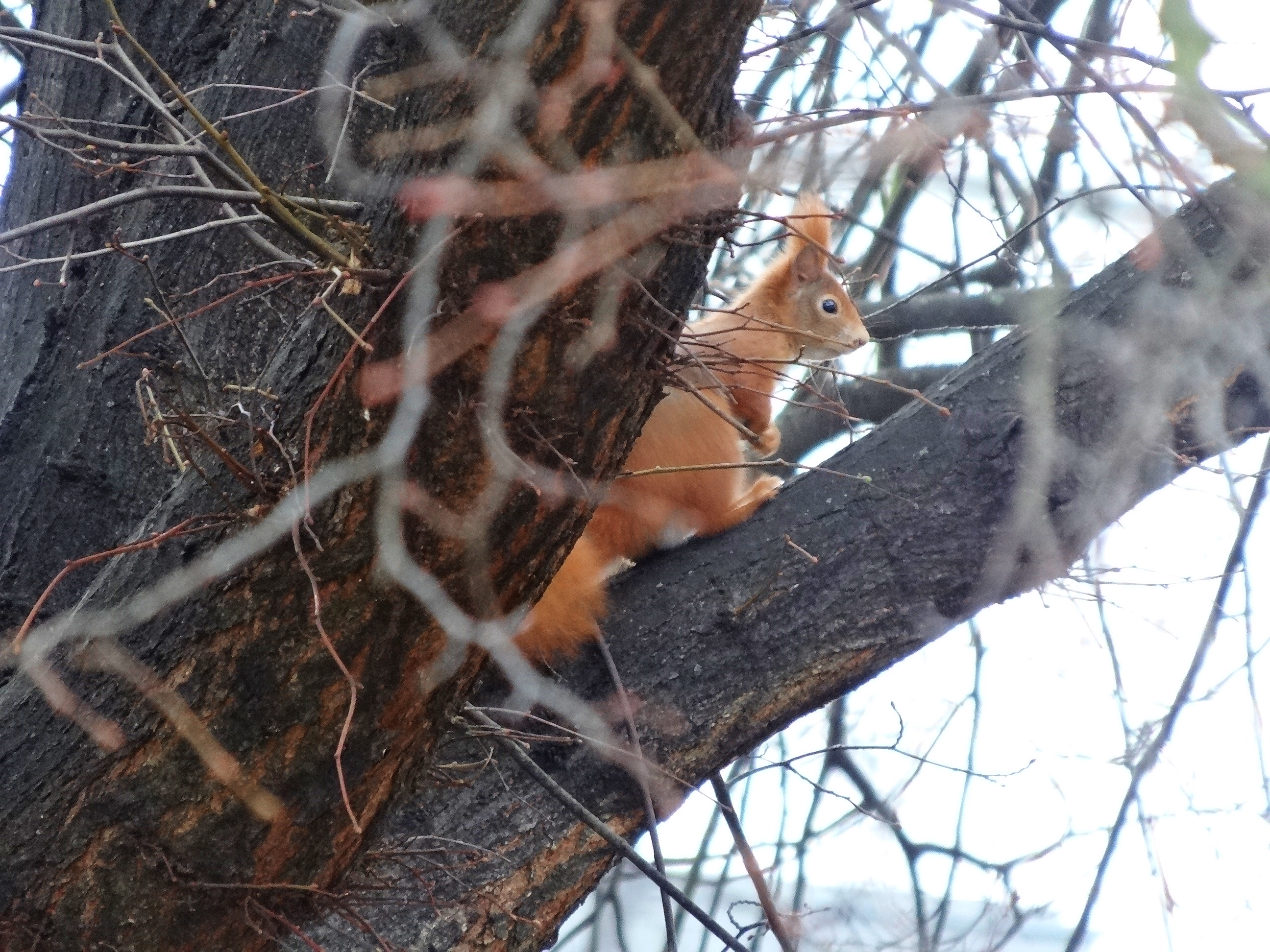 Eichhörnchen in der Zinzendorfstraße, Dresden